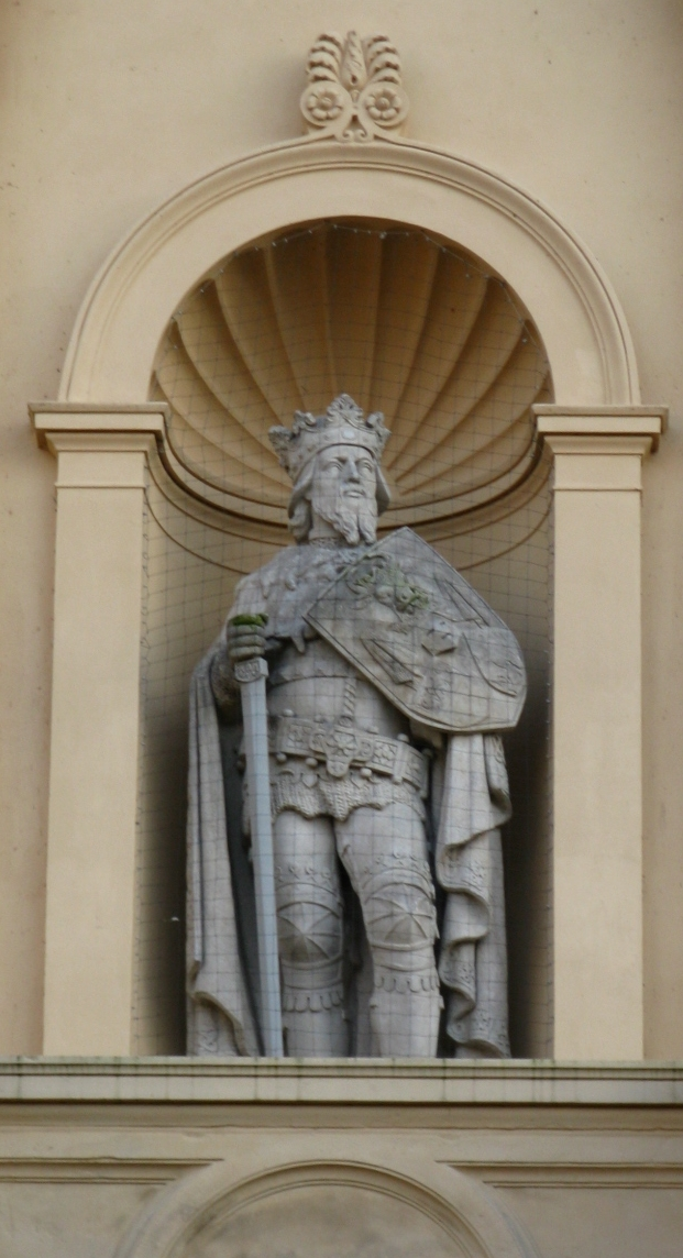 Statue Albrecht II., Herzog zu Mecklenburg, von Christian Genschow, entstanden um 1855, in der Fassade des Schweriner Schlosses